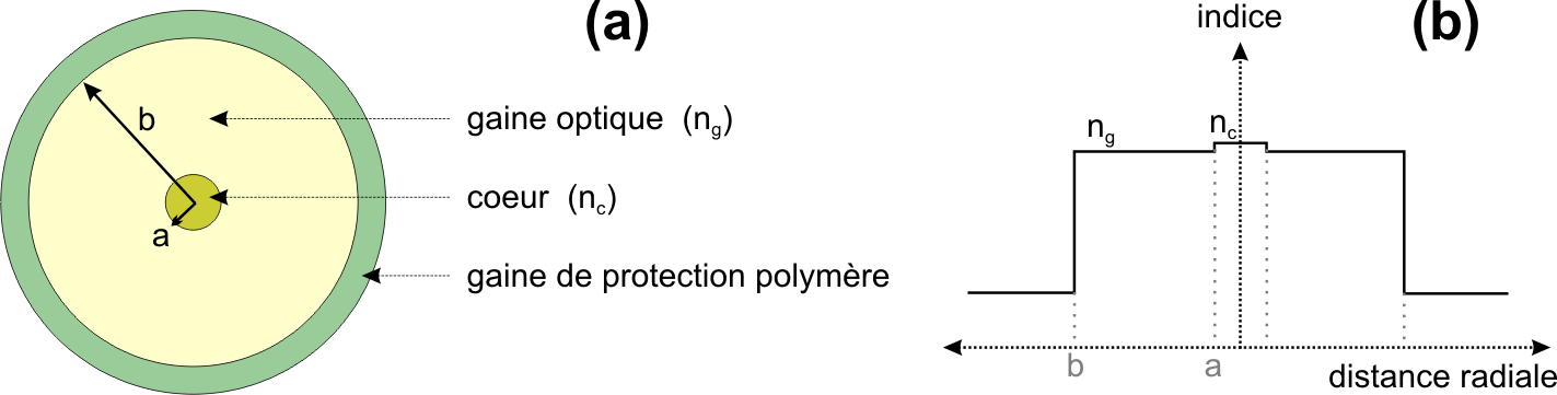 Principe d'une fibre optique à saut d'indice (a) Coupe d'une fibre optique montrant les différentes régions la composant : coeur, gaine optique et gaine de protection. Le coeur a un rayon a et la gaine un rayon b. (b) Profil d'indice de la fibre optique. Les indices optiques du coeur et de la gaine sont respectivement et . Auteur : Christophe.Finot